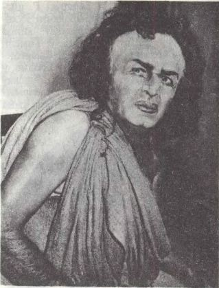 Б.В.Платонаў у ролі Эзопа ў спектаклі «Ліса і вінаград» Г. Фігейрэду. 1957. Грым Платонава пры Удзеле А. Тонкага